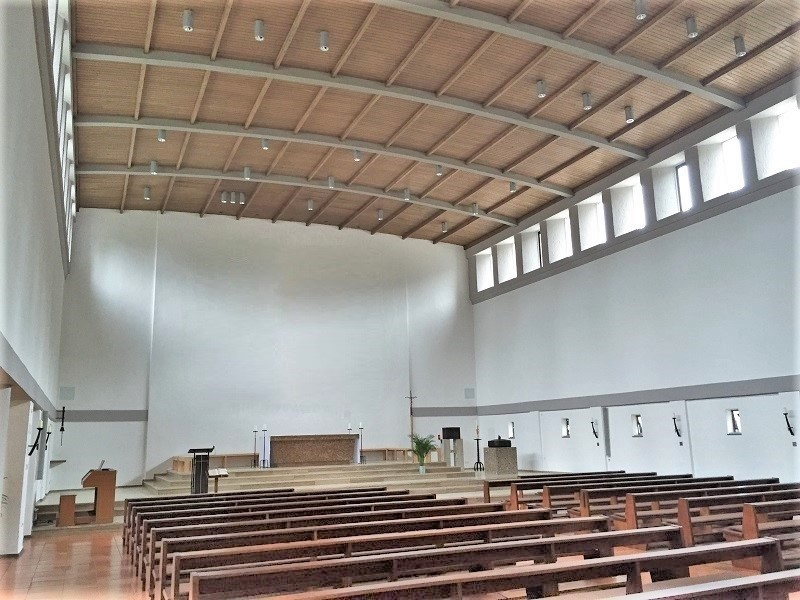 Mary Magdalene Church (Ottobrunn)